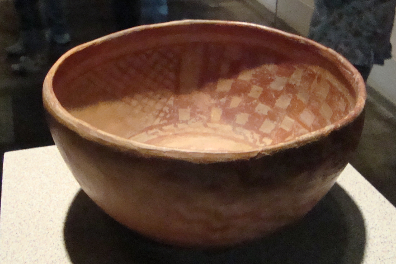 Vasija del tipo coyotlatelco, encontrada en Teotihuacan (México). Forma parte de la colección del Museo Nacional de Antropología.